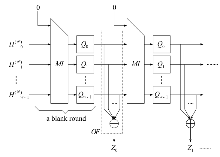 Функция финализации дайджеста Luffa